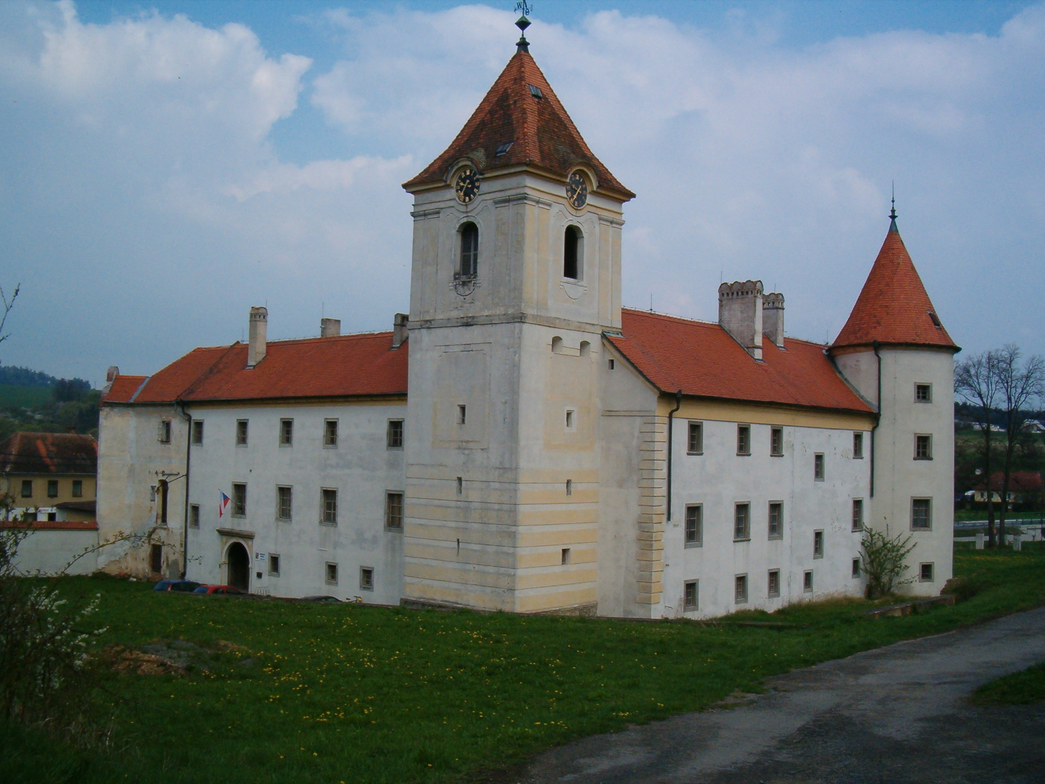 Zámek v Písečném